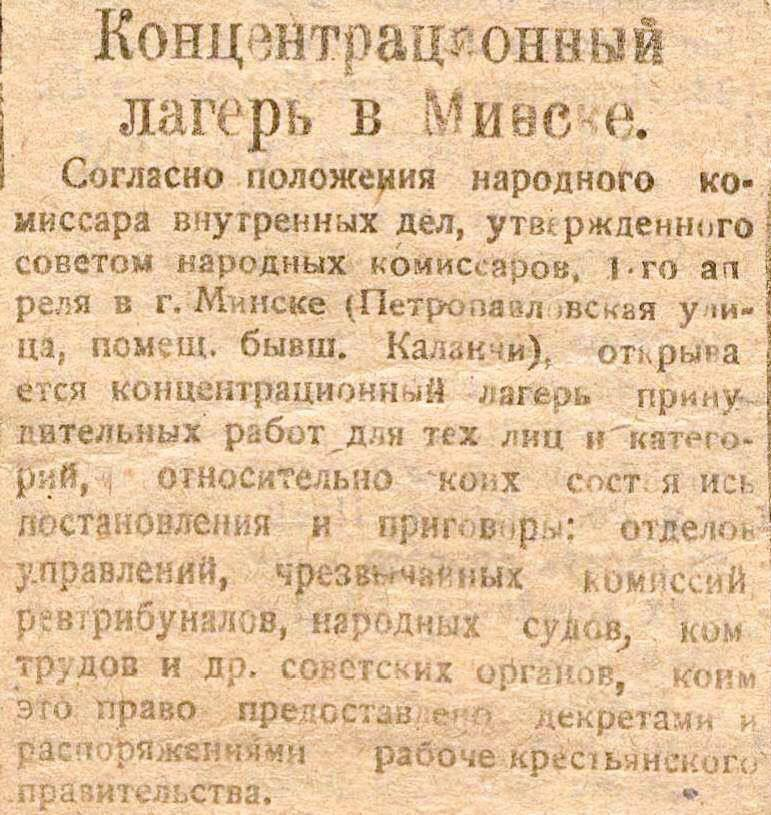 Беларуская (тарашкевіца): Першы савецкі канцэнтрацыйны лягер у Менску, створаны ў былым кляштары дамініканаў